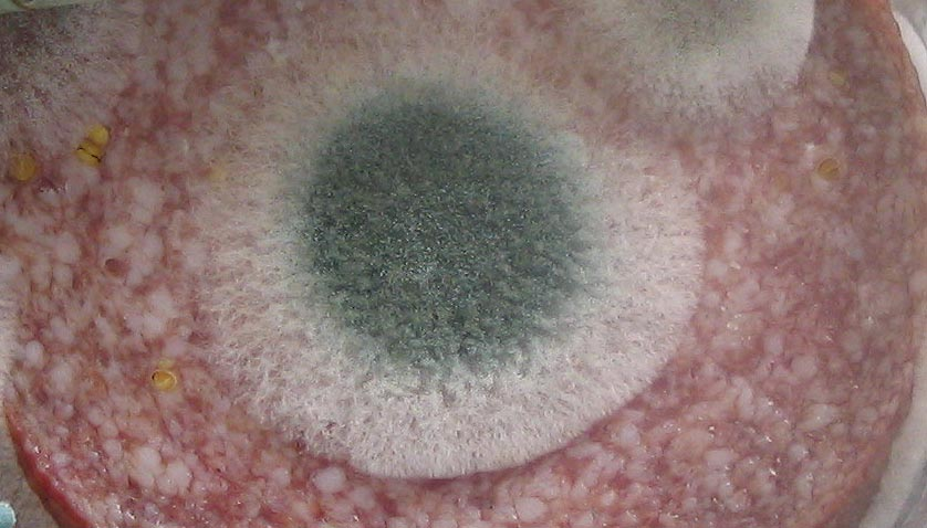 Verschimmelte Wurst